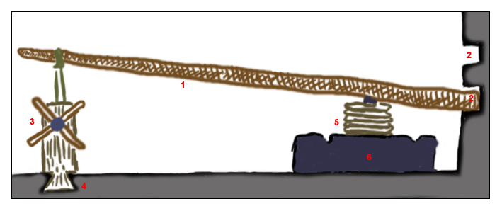 Schéma / dessin d'un pressoir à huile d'olive à queue d'aronde